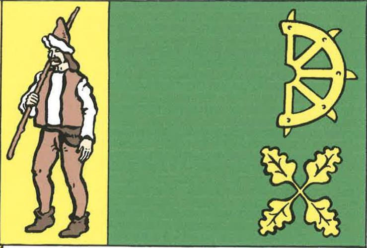 Košík vlajka